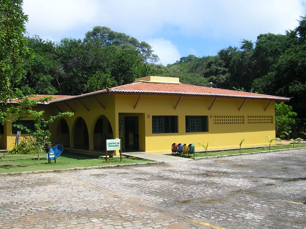 Centro de Pesquisa (Research Center) em Parque das Dunas. Natal, Brasil.